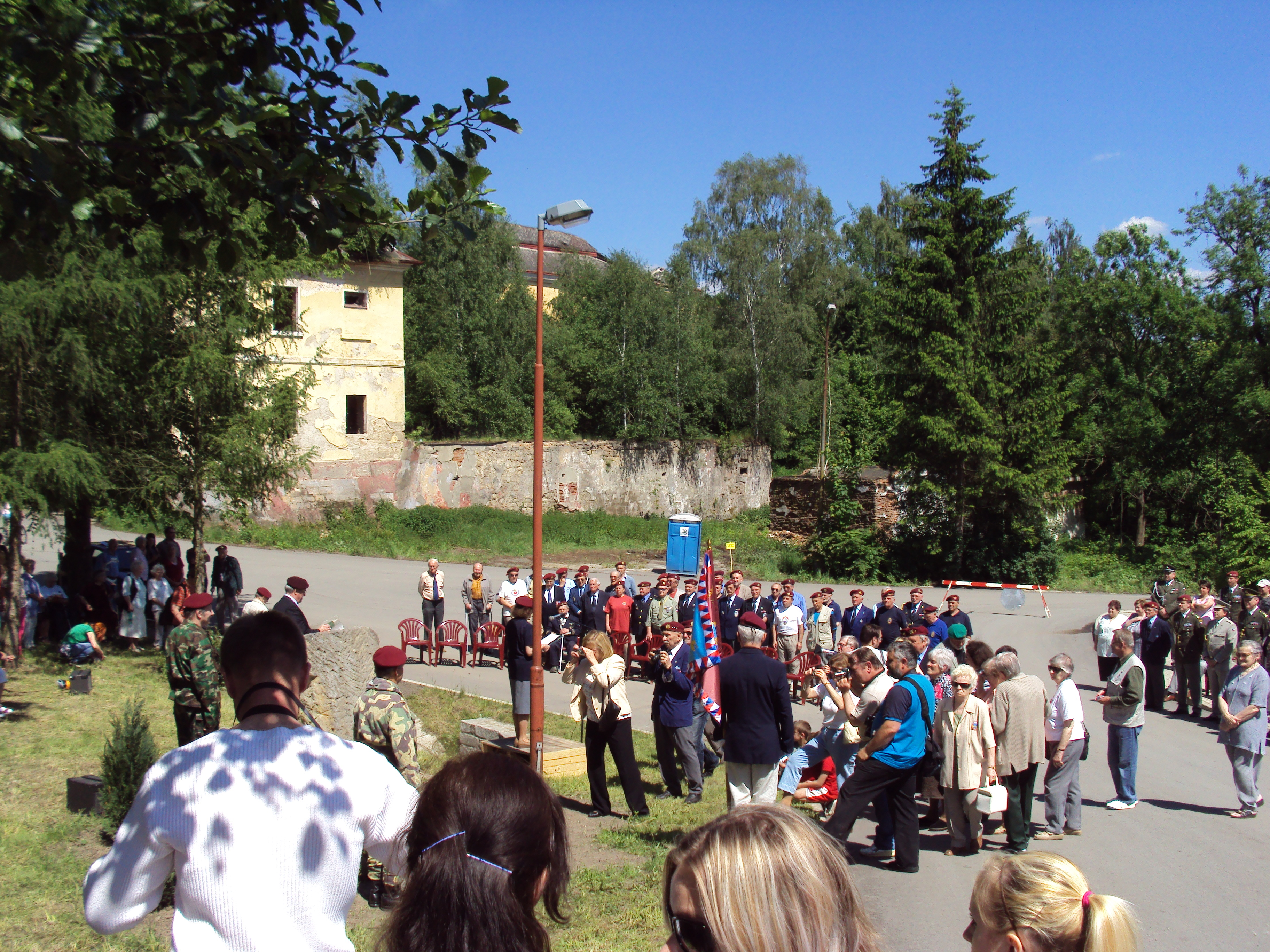 Česky: Vzpomínková slavnost veteránů 71.praporu parašutistů s odhalením památníku v Nových Zákupech